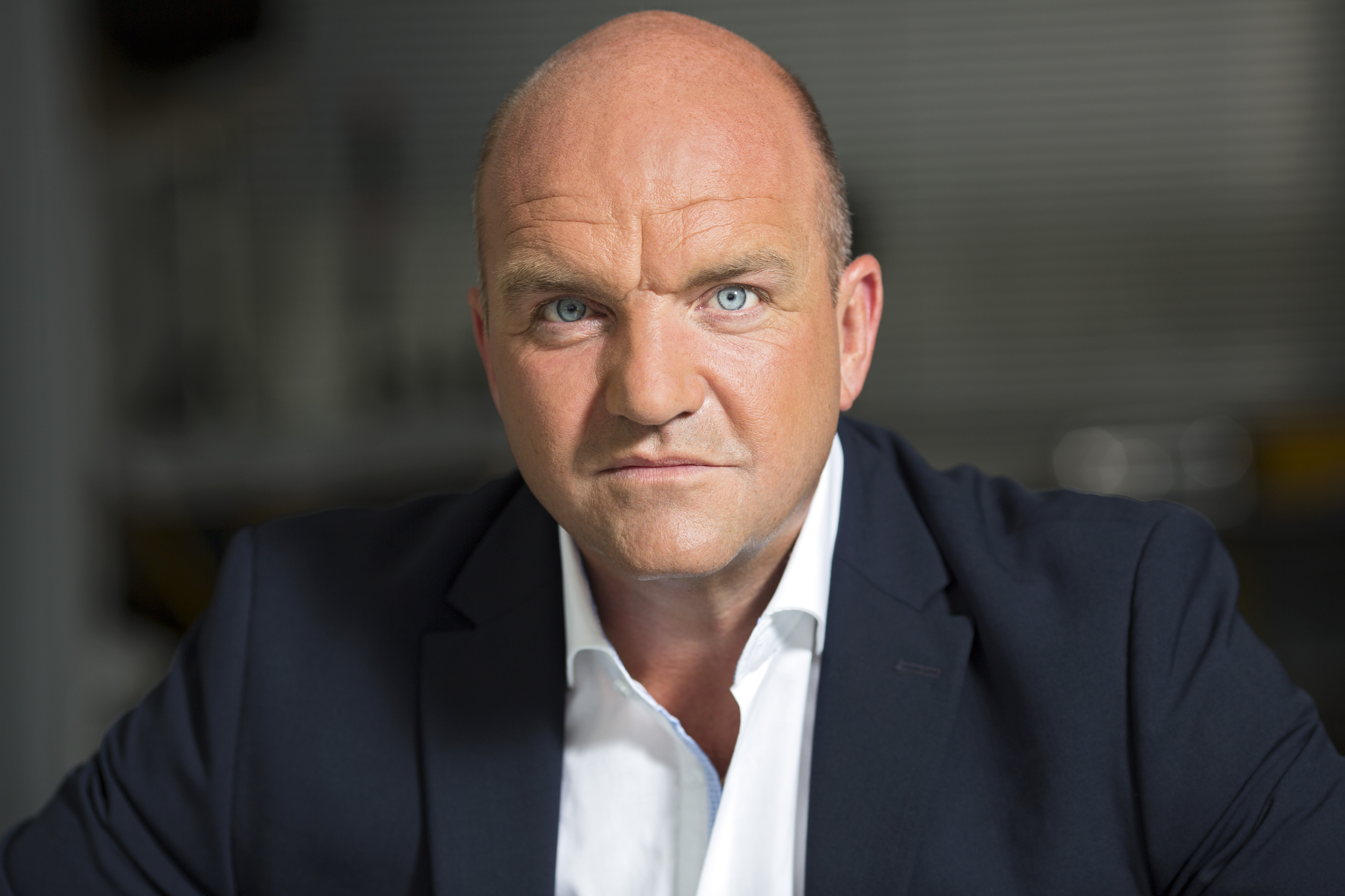 Markus Wieser, Präsident der Kammer für Arbeiter und Angestellte Niederösterreichs